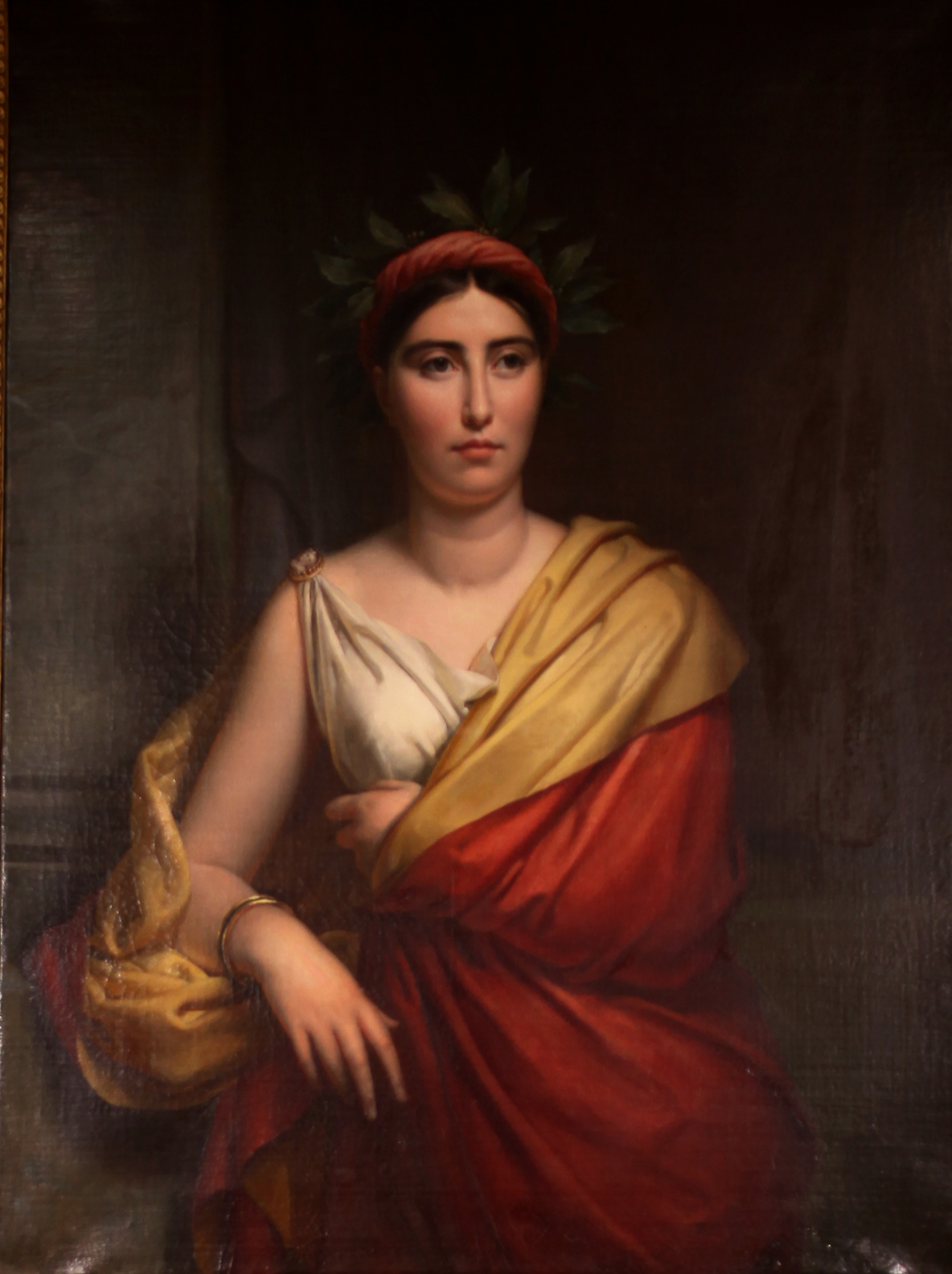 François Gérard (1770-1837) Ritratto della cantante Giuditta Pasta (1797-1865); dono degli eredi Ferranti-Pasta; Museo del Teatro alla Scala, Milano. N.B. l'immagine è stata riportata alle corrette proporzioni attraverso l'utilizzo di software, quindi non garantisce la precisione nel rapporto fra base e altezza del dipinto né la mancanza di distorsioni. I colori sono invece fedele ripoduzione dell'originale, così come le condizioni generali della tela. L'immagine è caricata per puri motivi documentaristici.